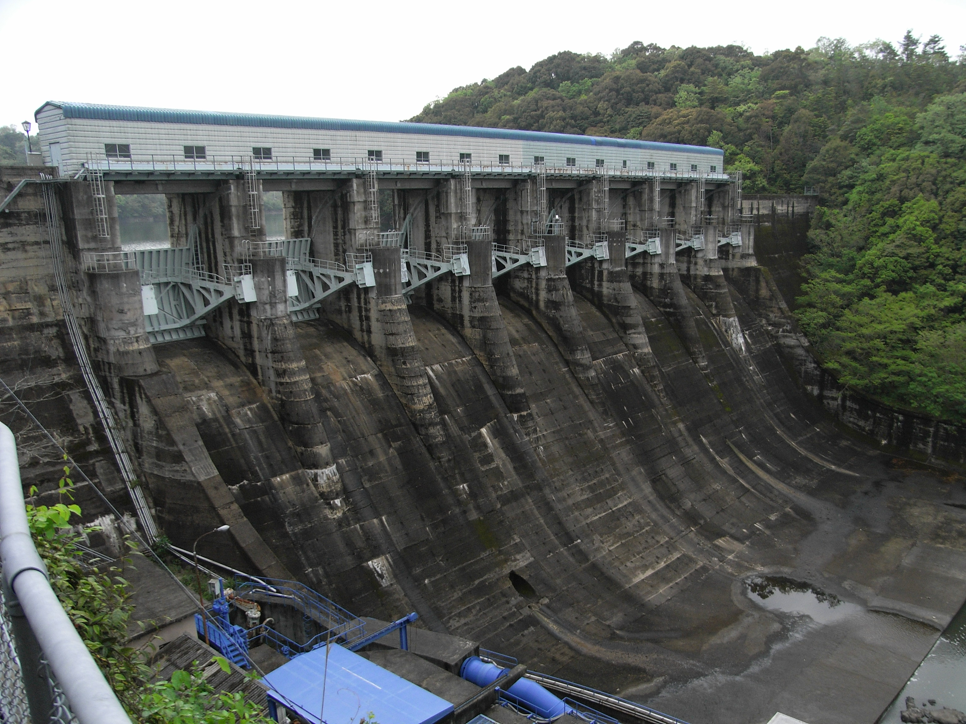 Dam